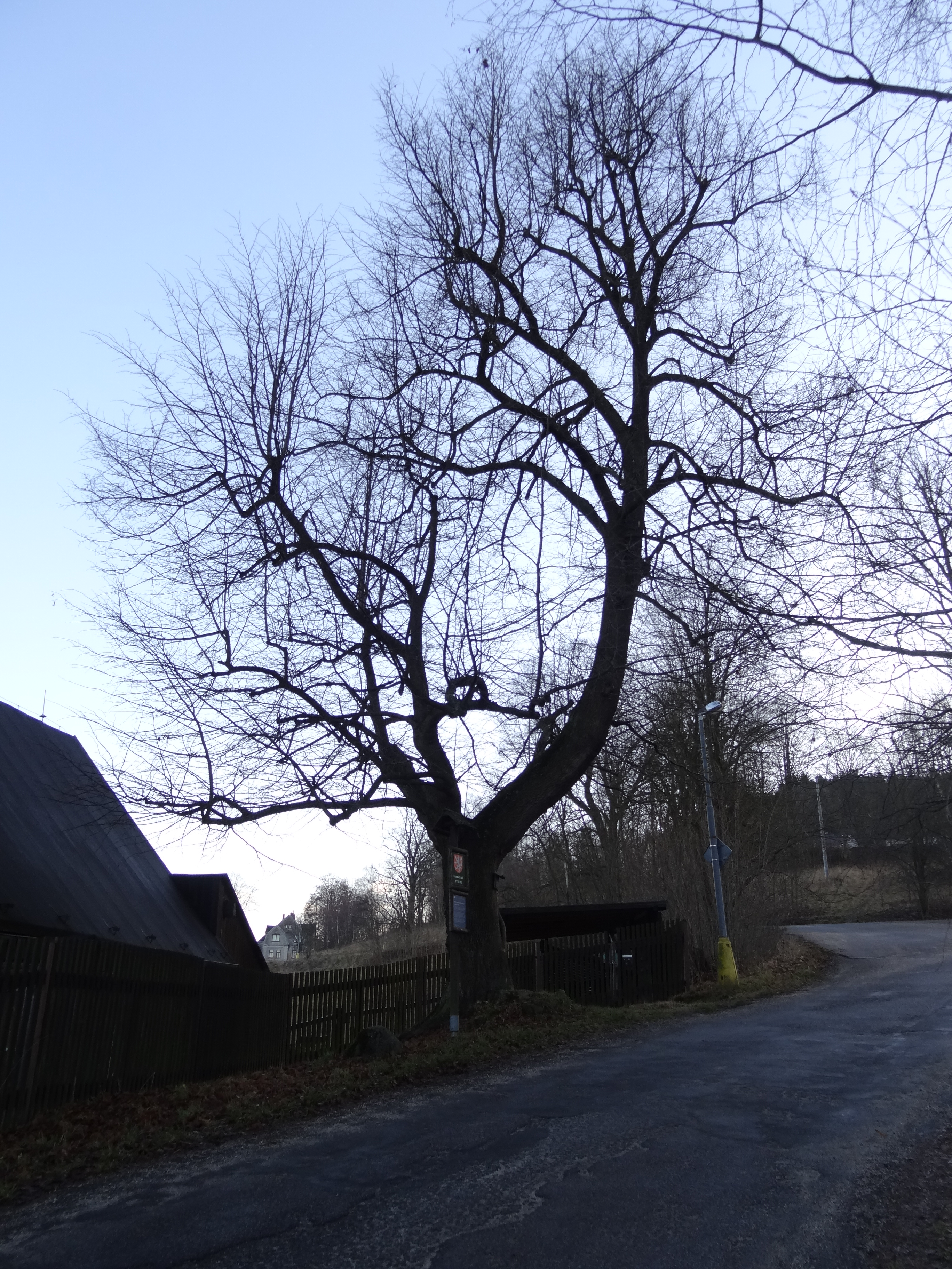 Jablonecké Paseky - památná Císařská lípa